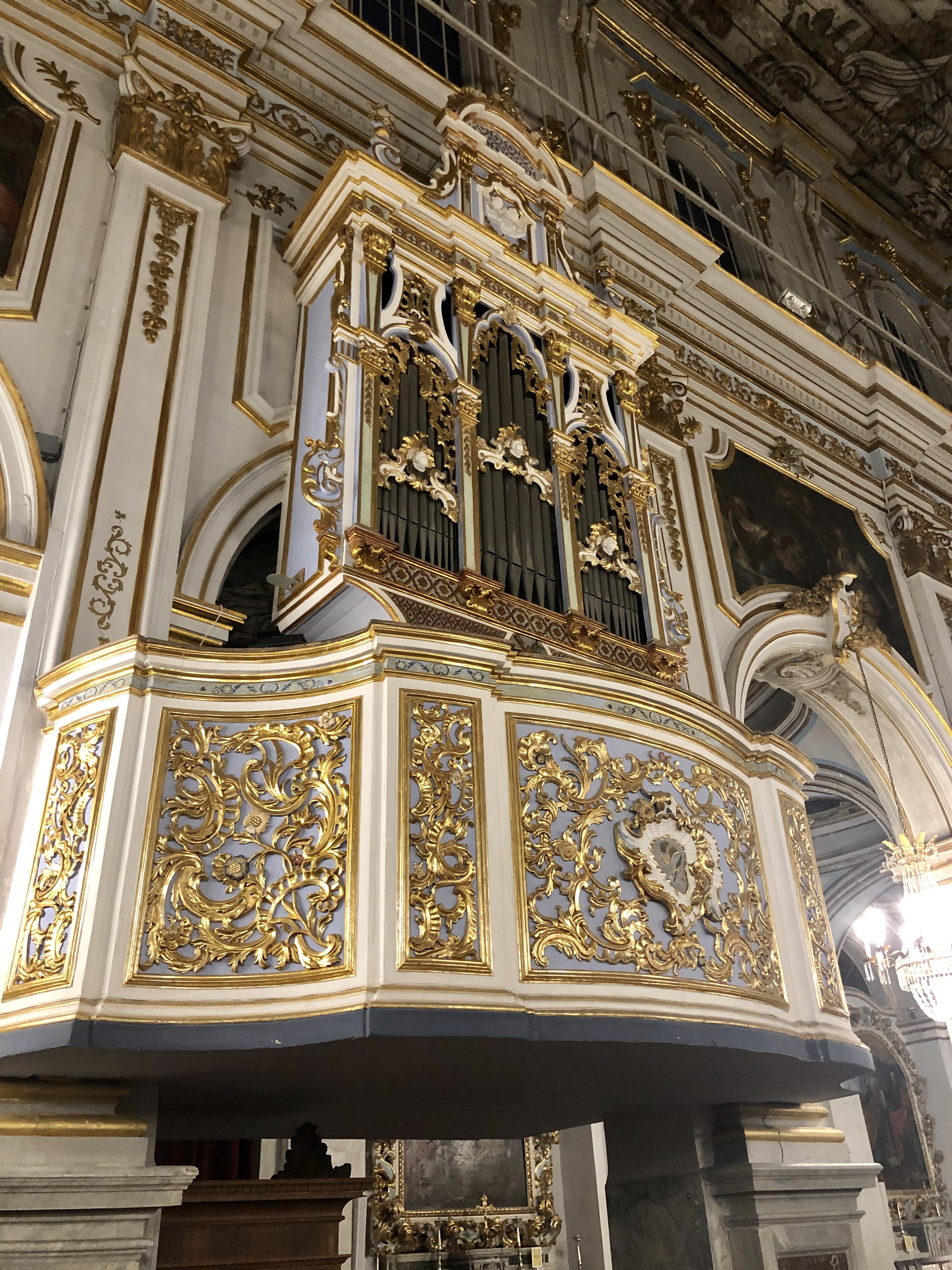 Interni basilica San Sebastiano, Melilli